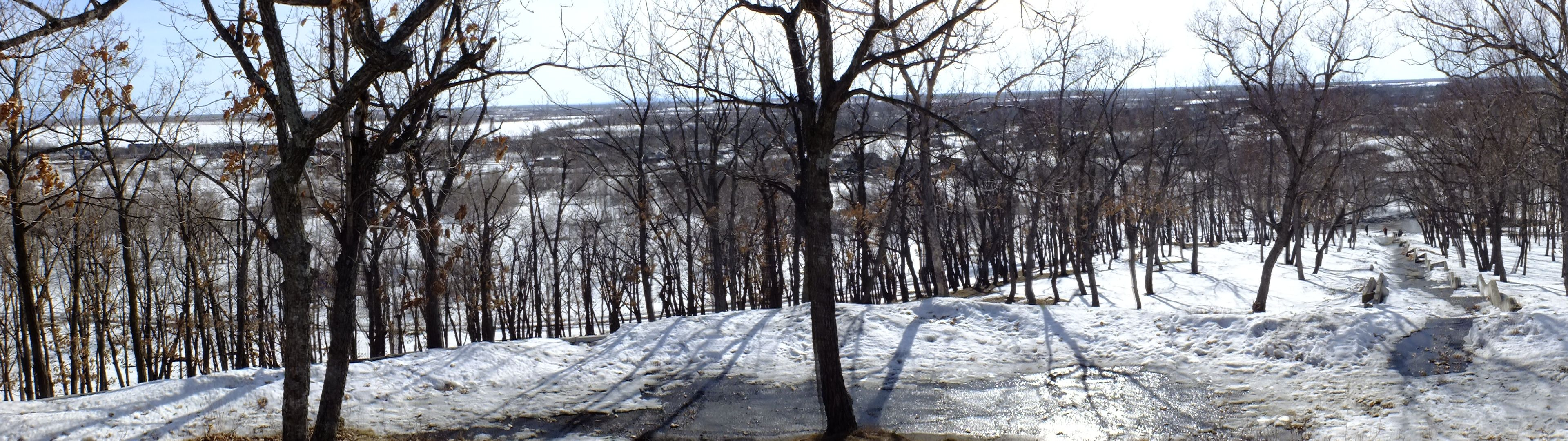 Volochaevka-1